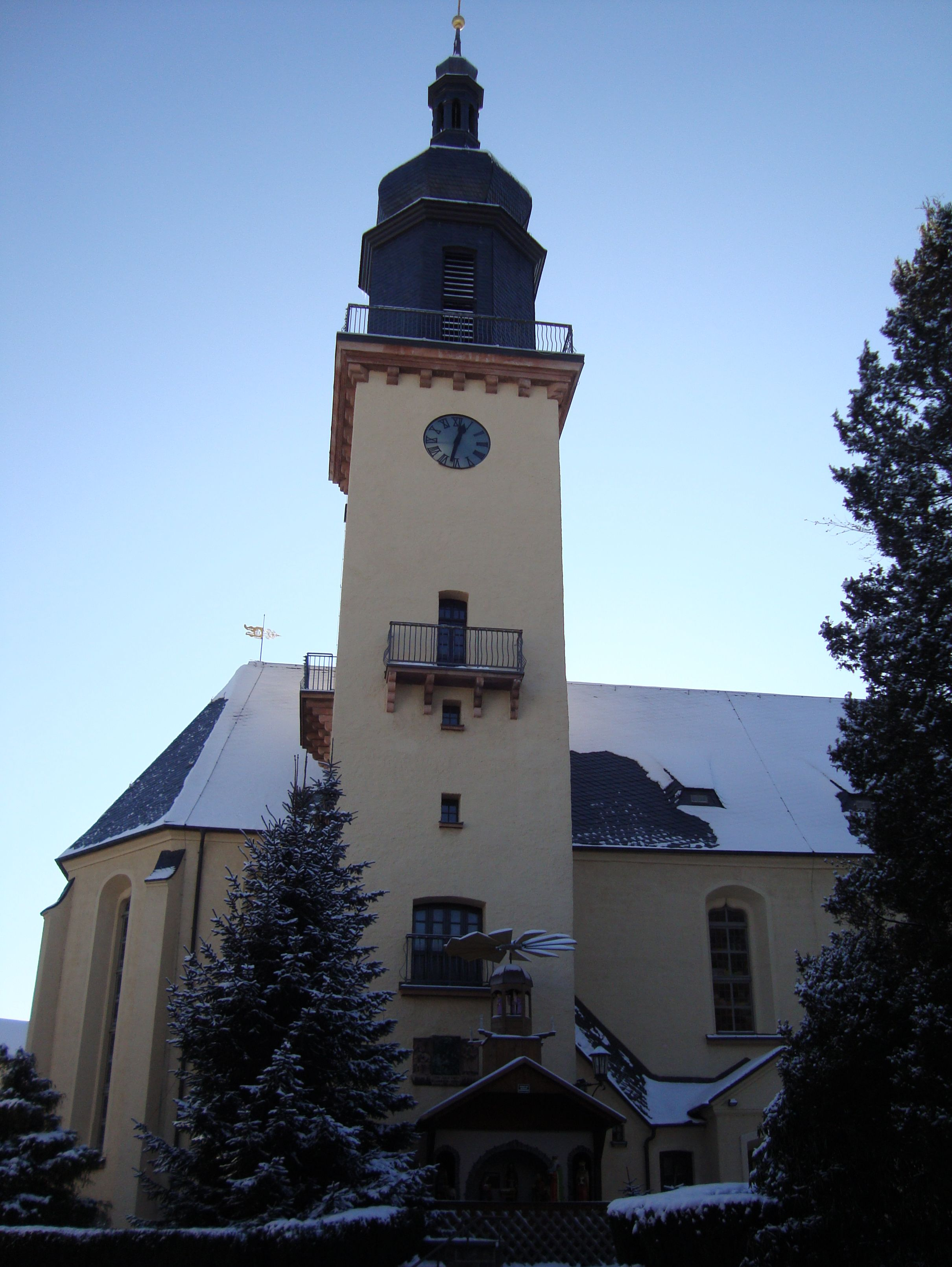 Annenkirche in Thum